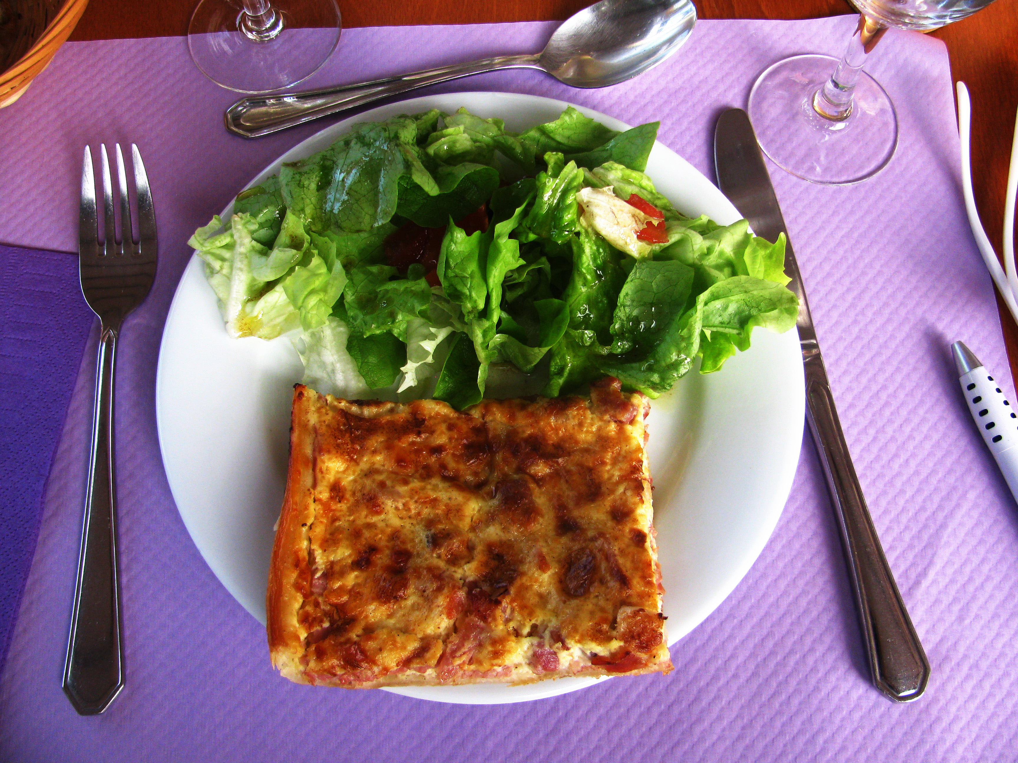 Tourte aux fruits de mer